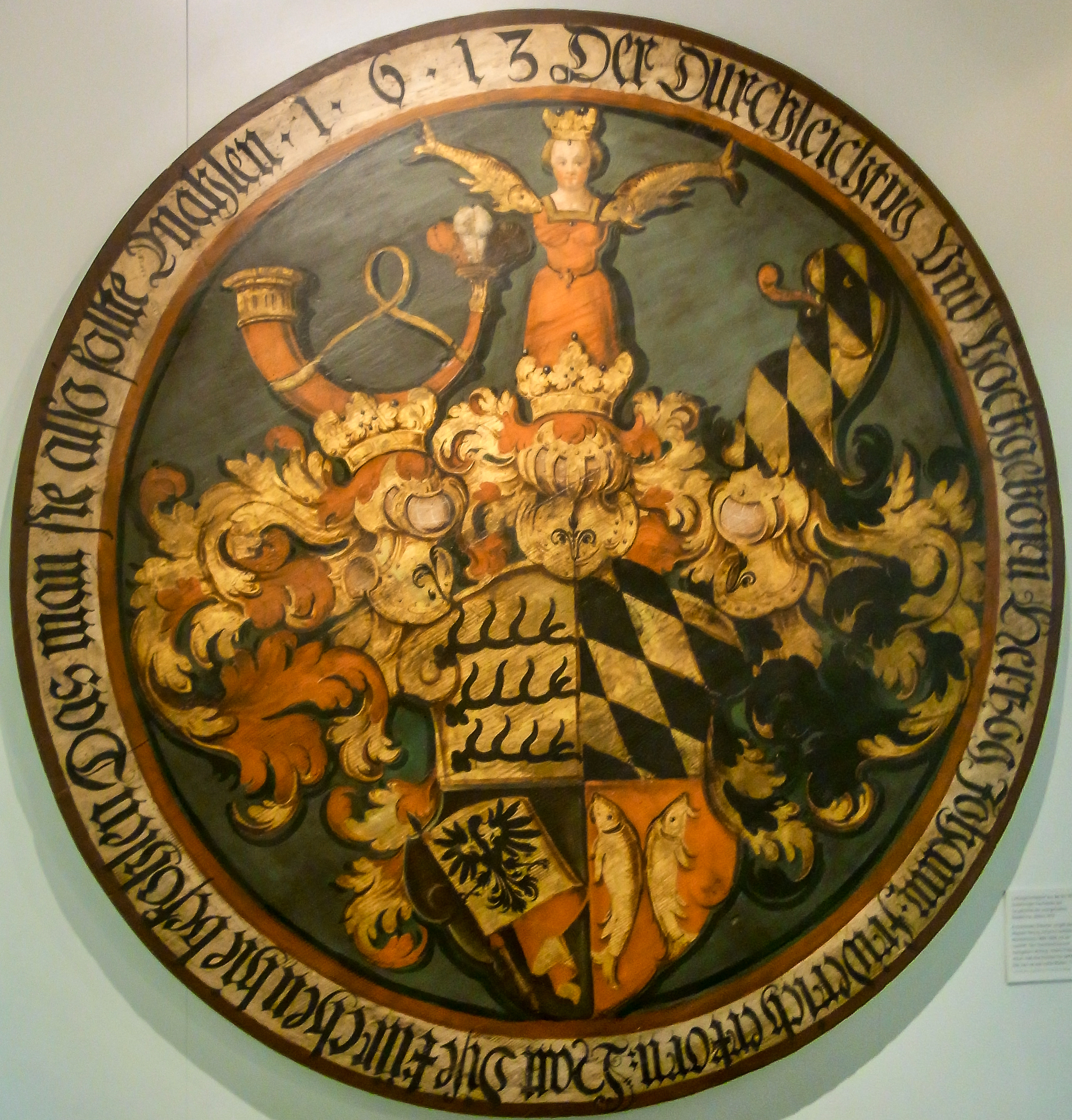 Balingen - Zehntscheuer - Heimatmuseum - Wappenscheibe aus der Stadtkirche von der Ausmalung der Kirche 1613